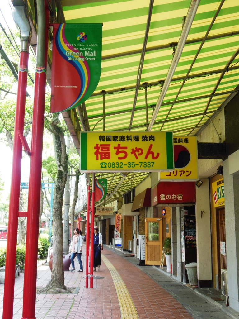 グリーンモール商店街